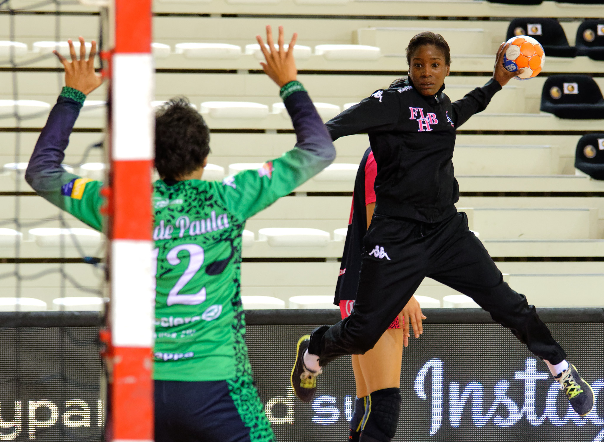 Rencontre de championnat entre Issy Paris Hand et fleury. A Issy Les Moulineaux, le 22 septembre 2015